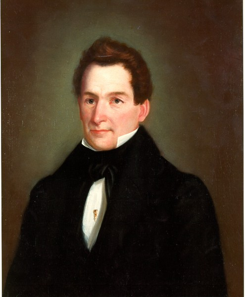 Firmin René Desloge (né le 17 février 1803 à Nantes - mort le 20 juillet 1856 à Potosi), est un financier et industriel américain d'origine française.